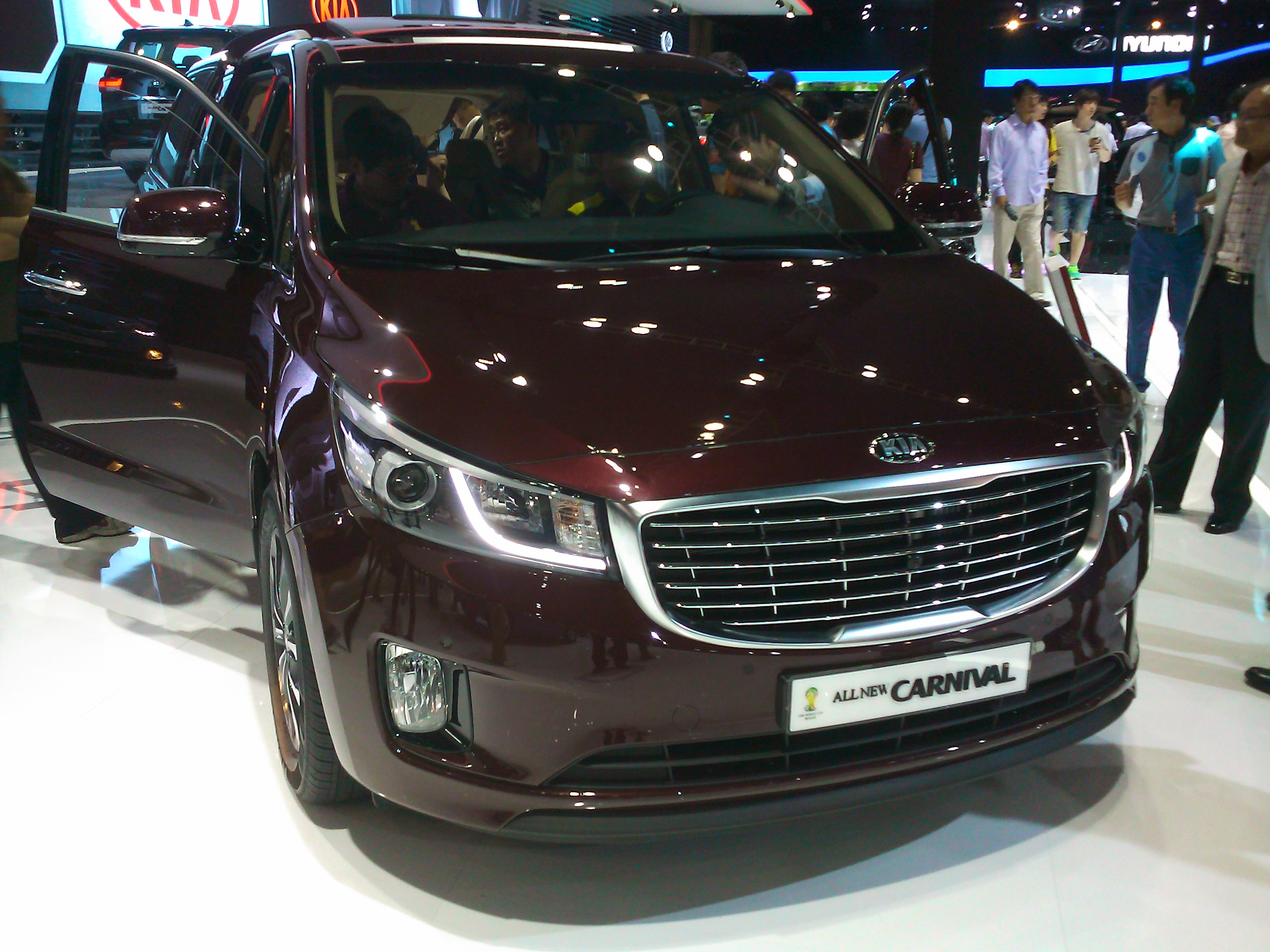 キア・カーニバル